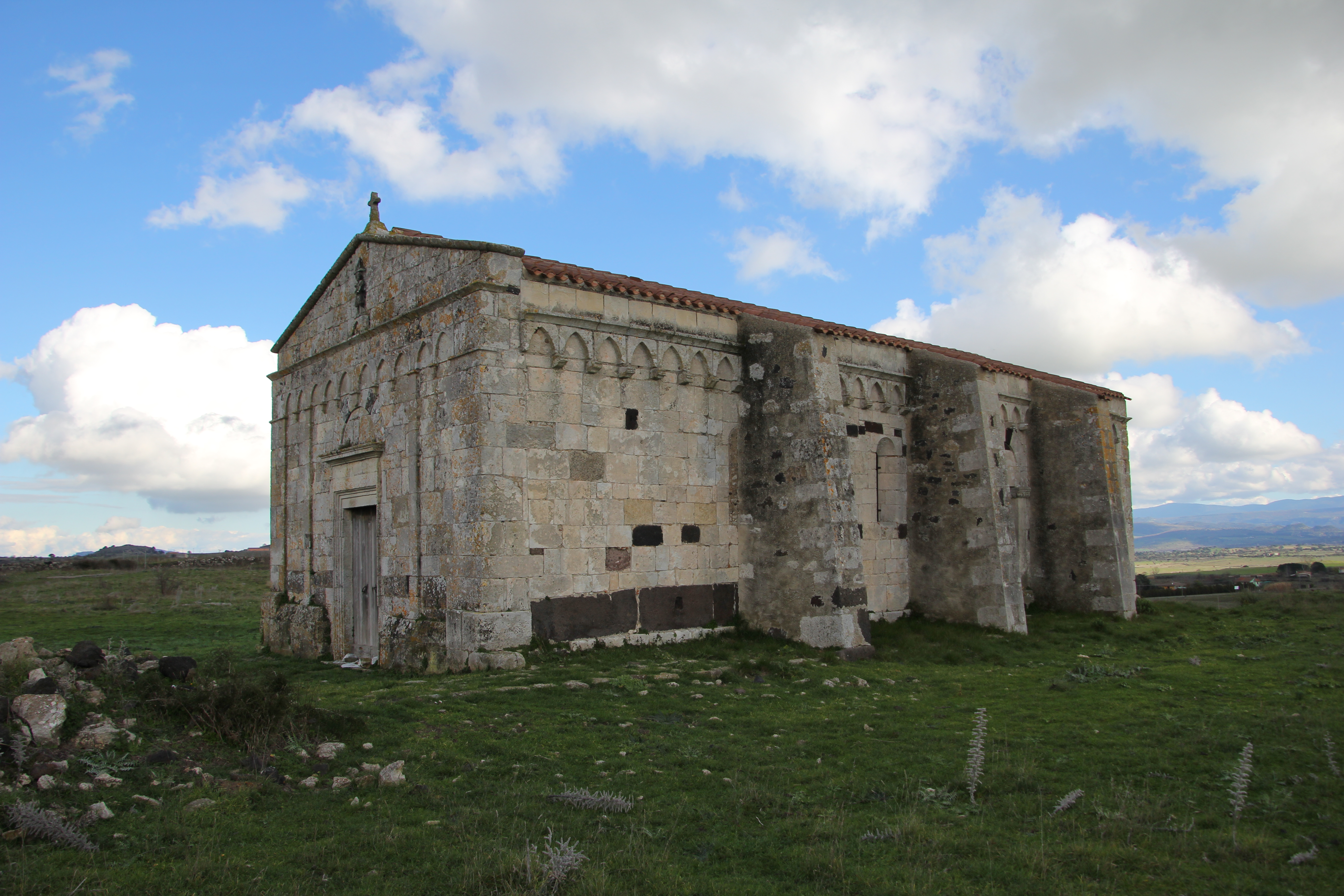 Chiesa romanica di Nostra Signora di Cabu Abbas, Torralba, Sardinia, Italy. Sec. XII - XIII